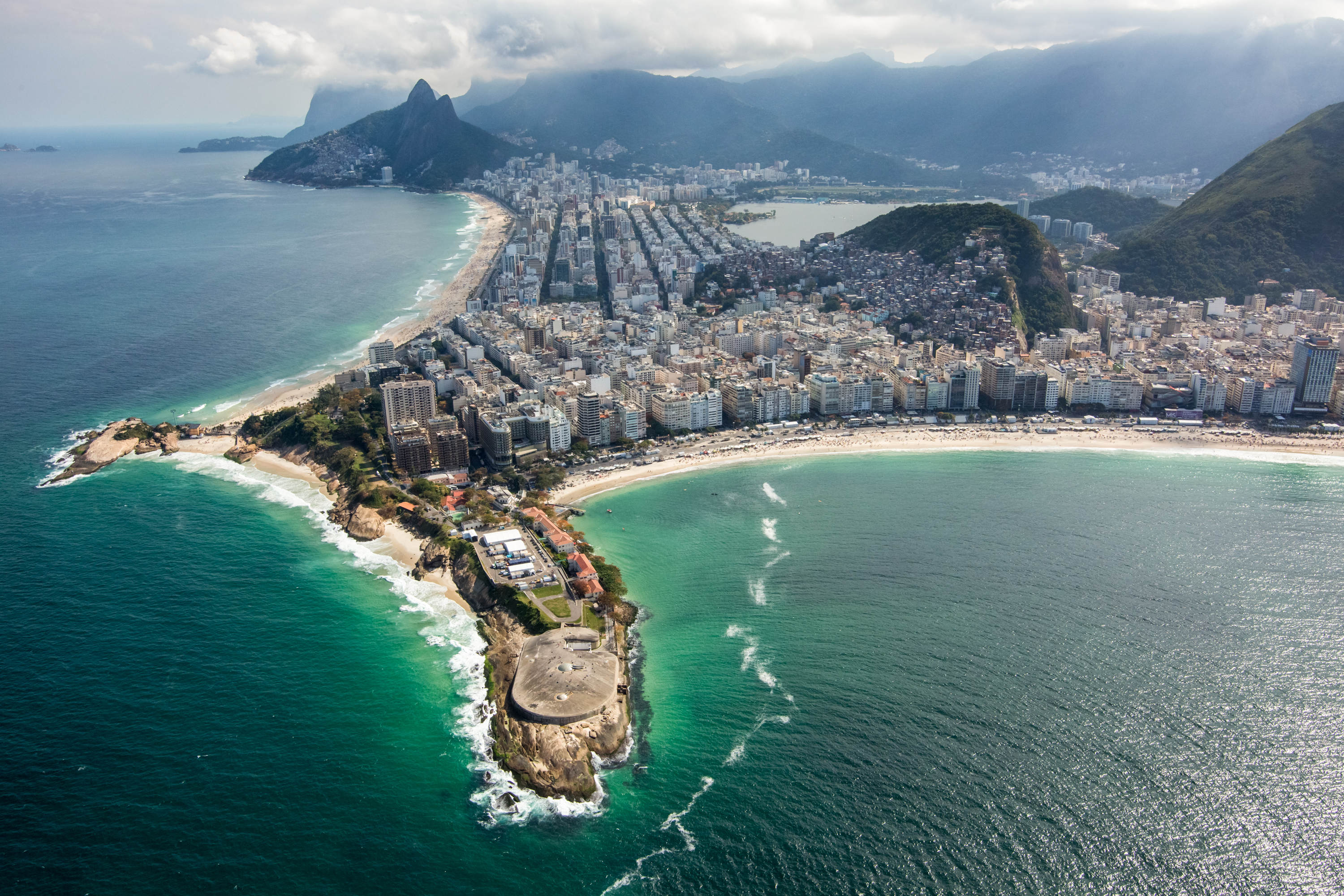 Trecho mostra a divisa entre Ipanema e Copacabana. A região do início da praia de Copacabana será palco da maratona aquática e da natação do triatlo. Na Praia de Copacabana, ao fundo, serão disputadas as provas de maratonas aquáticas e triatlo, além do vôlei